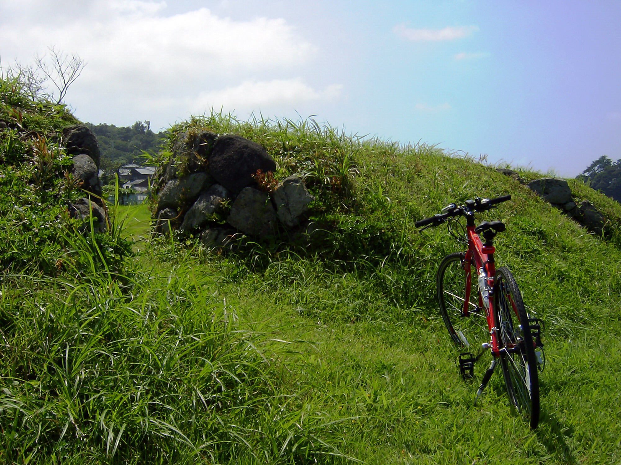 丸岡藩 梶台場跡 砲眼